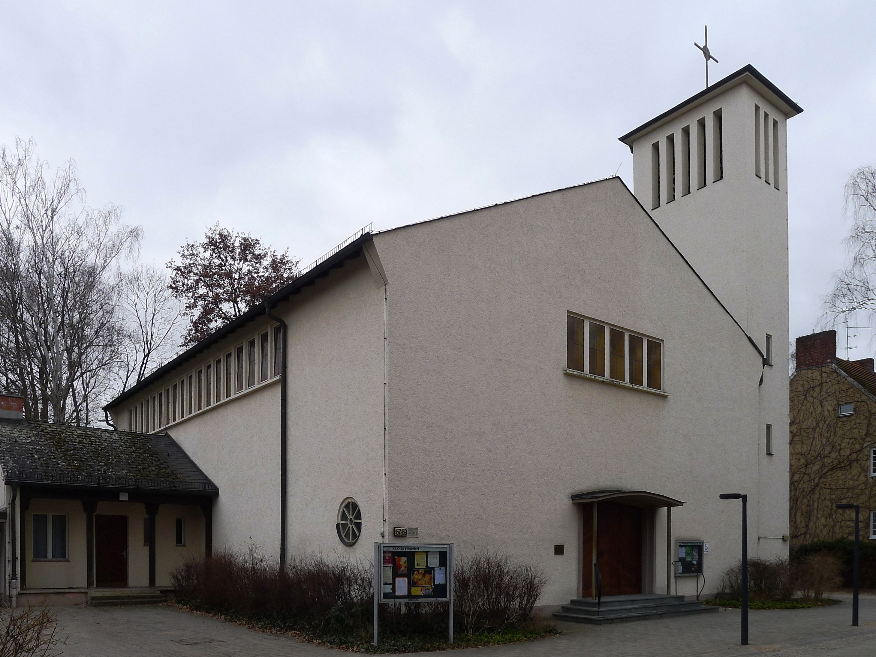 Blick auf St. Otto in Berlin-Zehlendorf